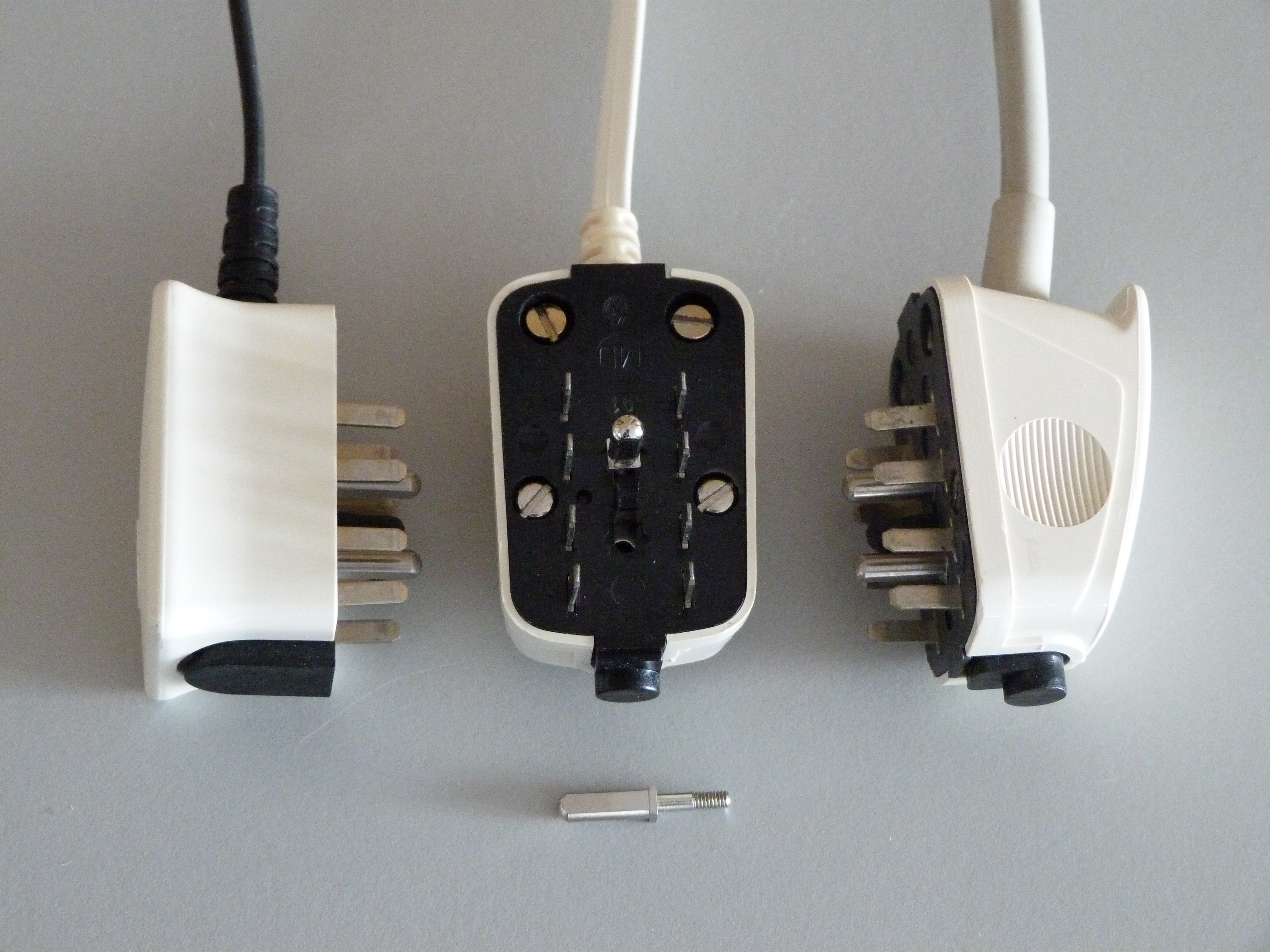 Anschlussstecker ADoS 8 in verschiedenen Bauformen. Das mittlere Bild zeigt, dass die Steckerstifte im Winkel von 45 Grad einstellbar sind.